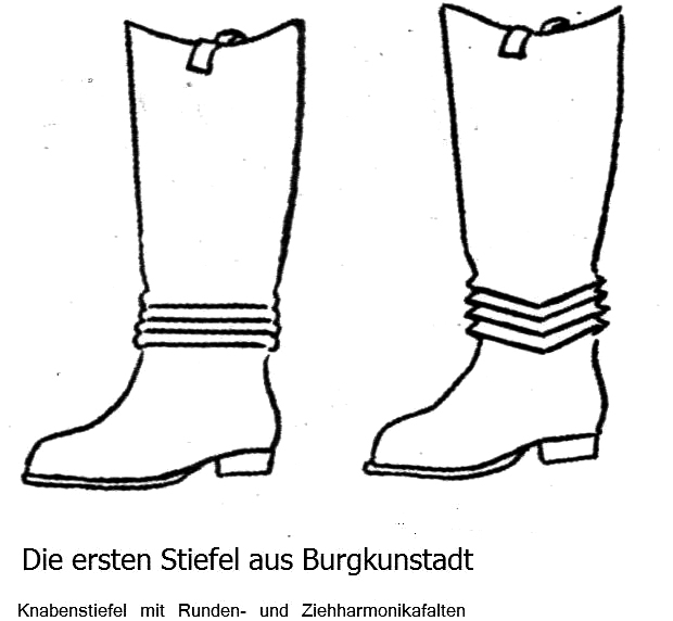 Skizze der ersten Stiefel aus Burgkunstadt, gefertigt in der Schuhfabrik Weihermann